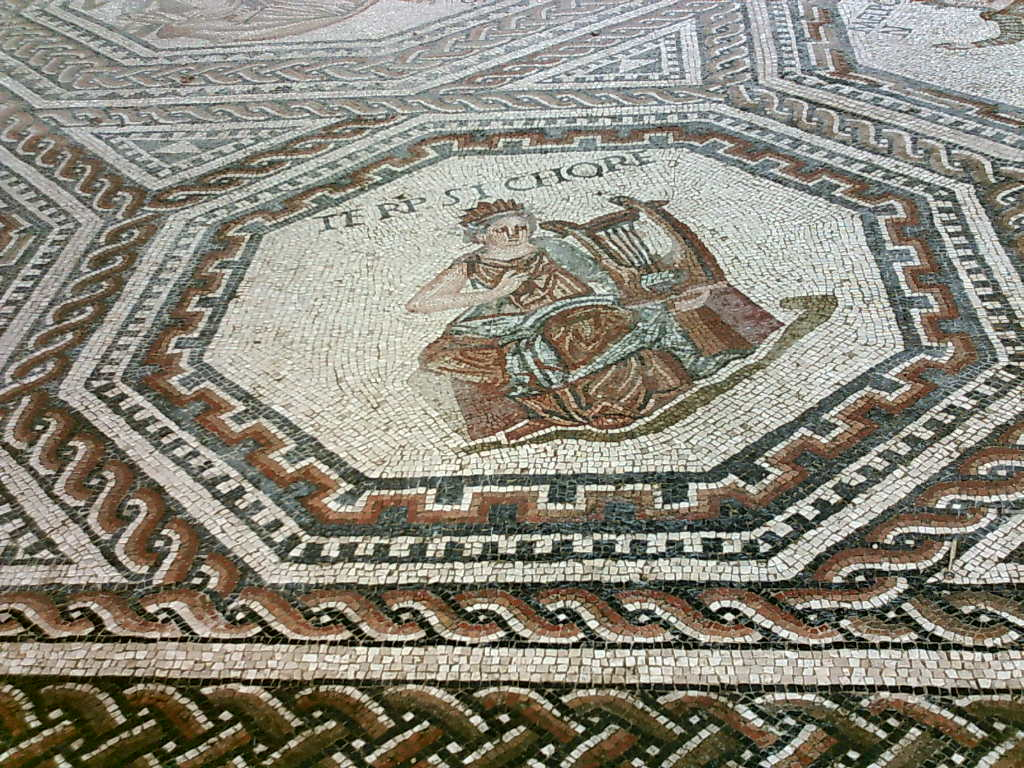 Terpsichore auf dem röm. Mosaik in Vichten, selbst fotografiert, April 2006, --Xocolatl 03:14, 22 April 2006 (UTC)